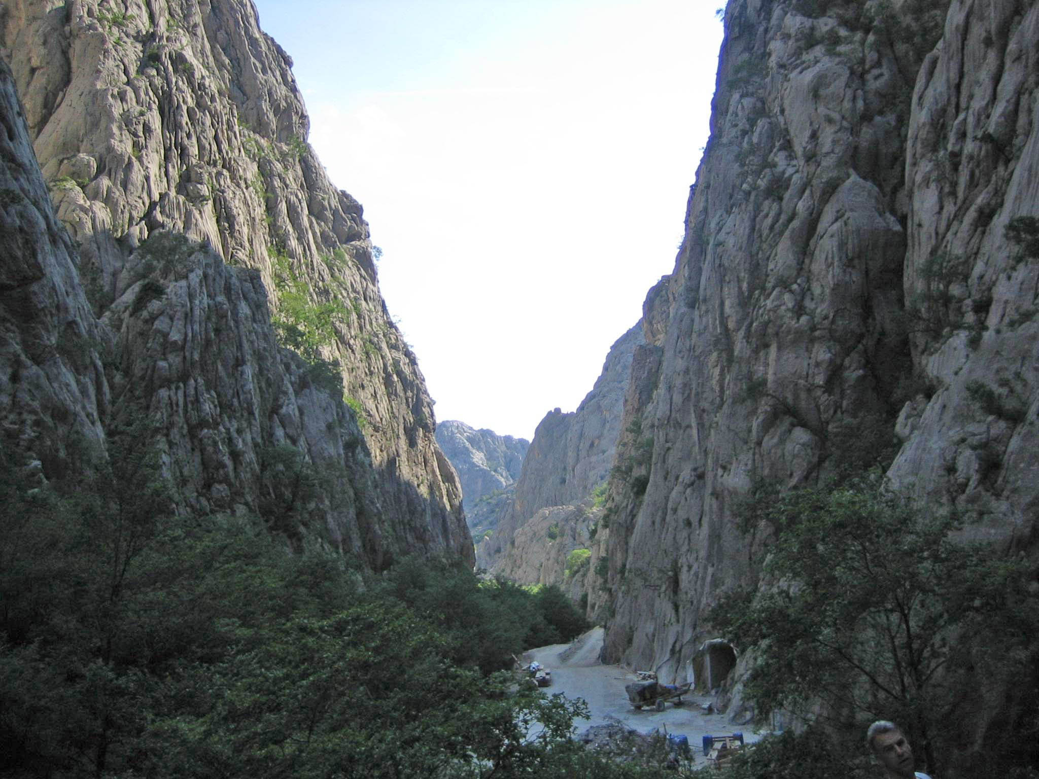 Paklenica valley